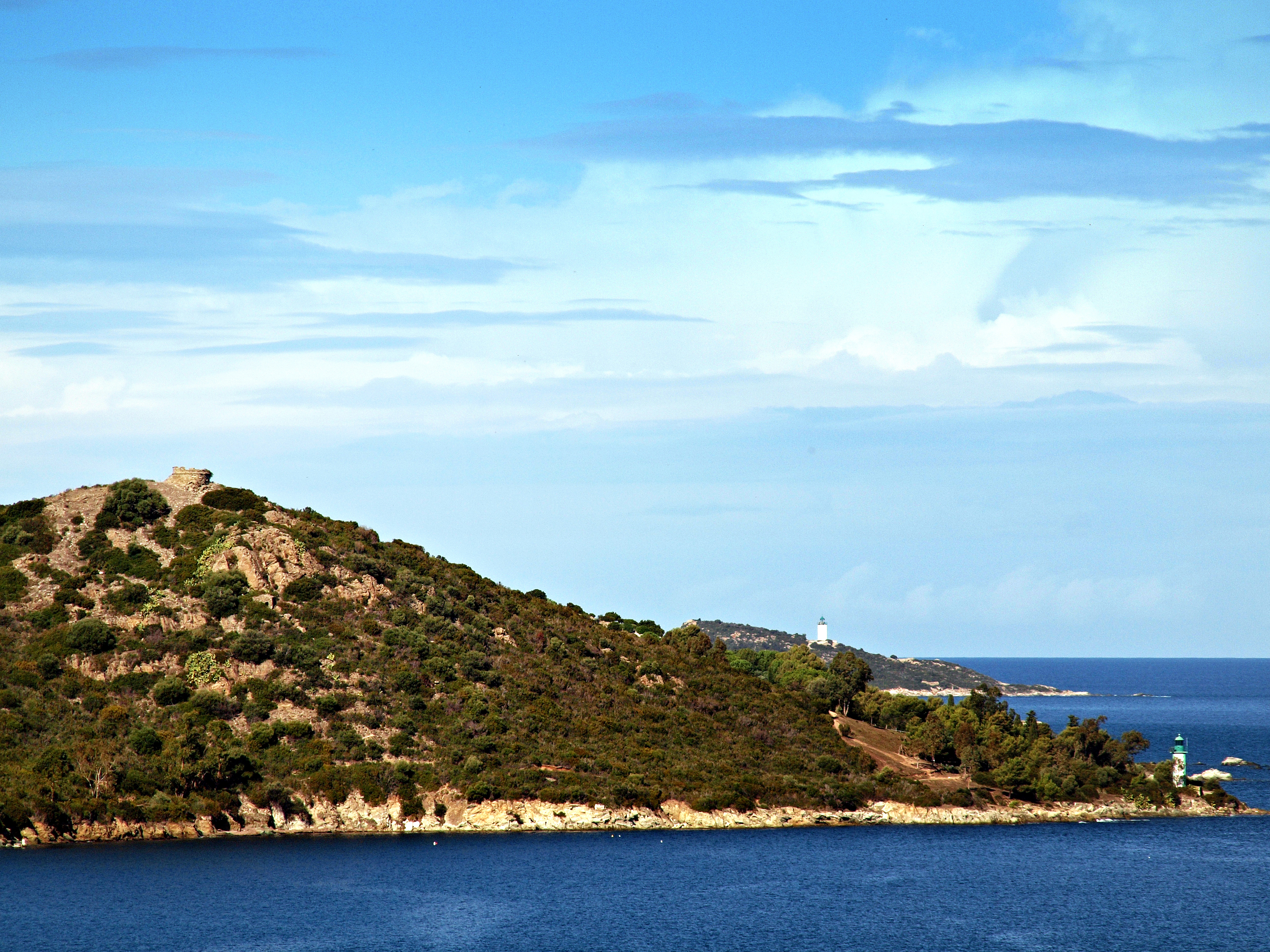 Saint-Florent, Nebbio (Corse) - Tour génoise de Fornali ruinée